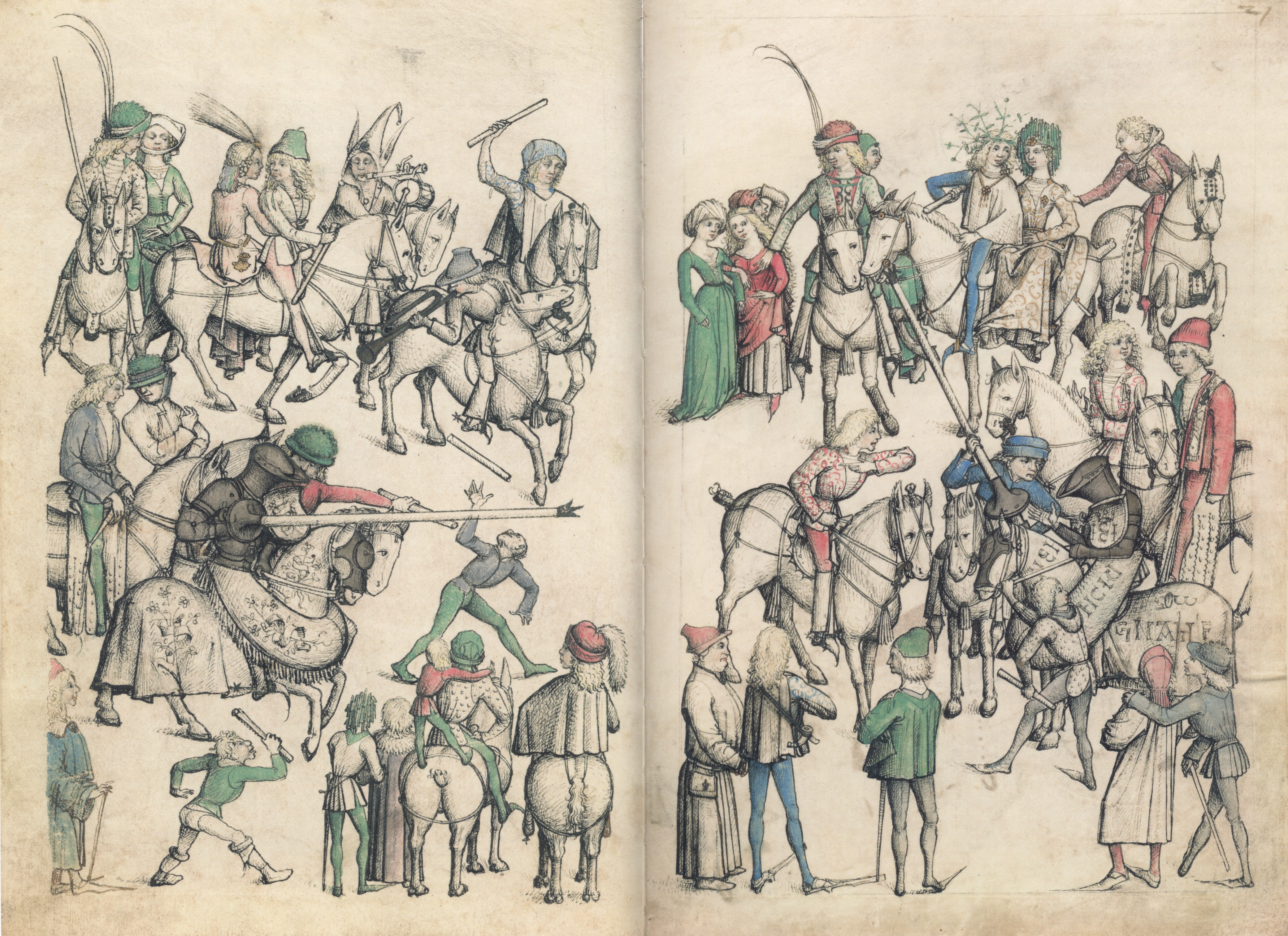 Mittelalterliches Hausbuch von Schloss Wolfegg Doppelseite fol. 20v–21r (Das Krönleinstechen)